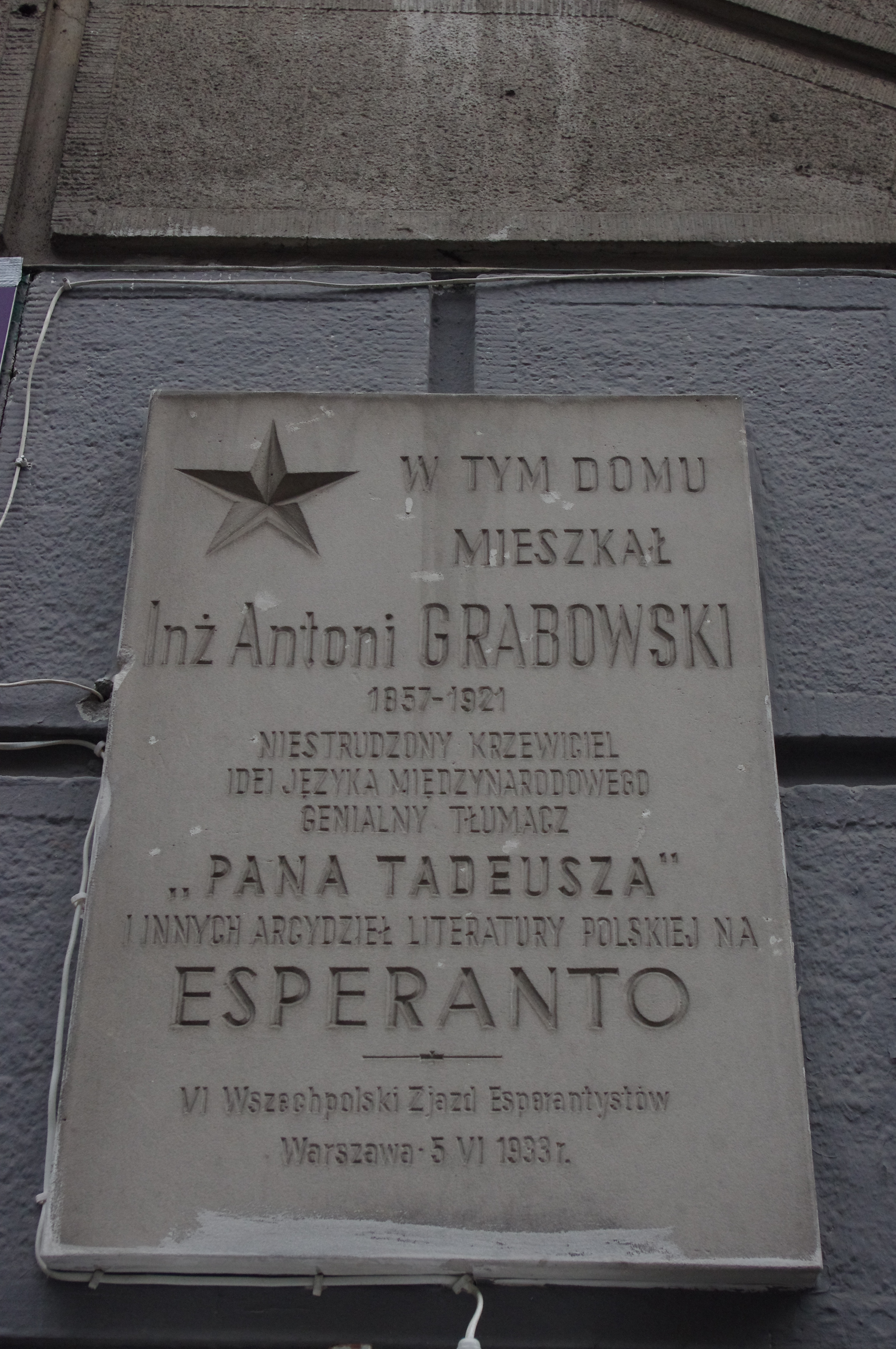 Tablica upamiętniająca Antoniego Grabowskiego na ul. Hożej 42 w Warszawie